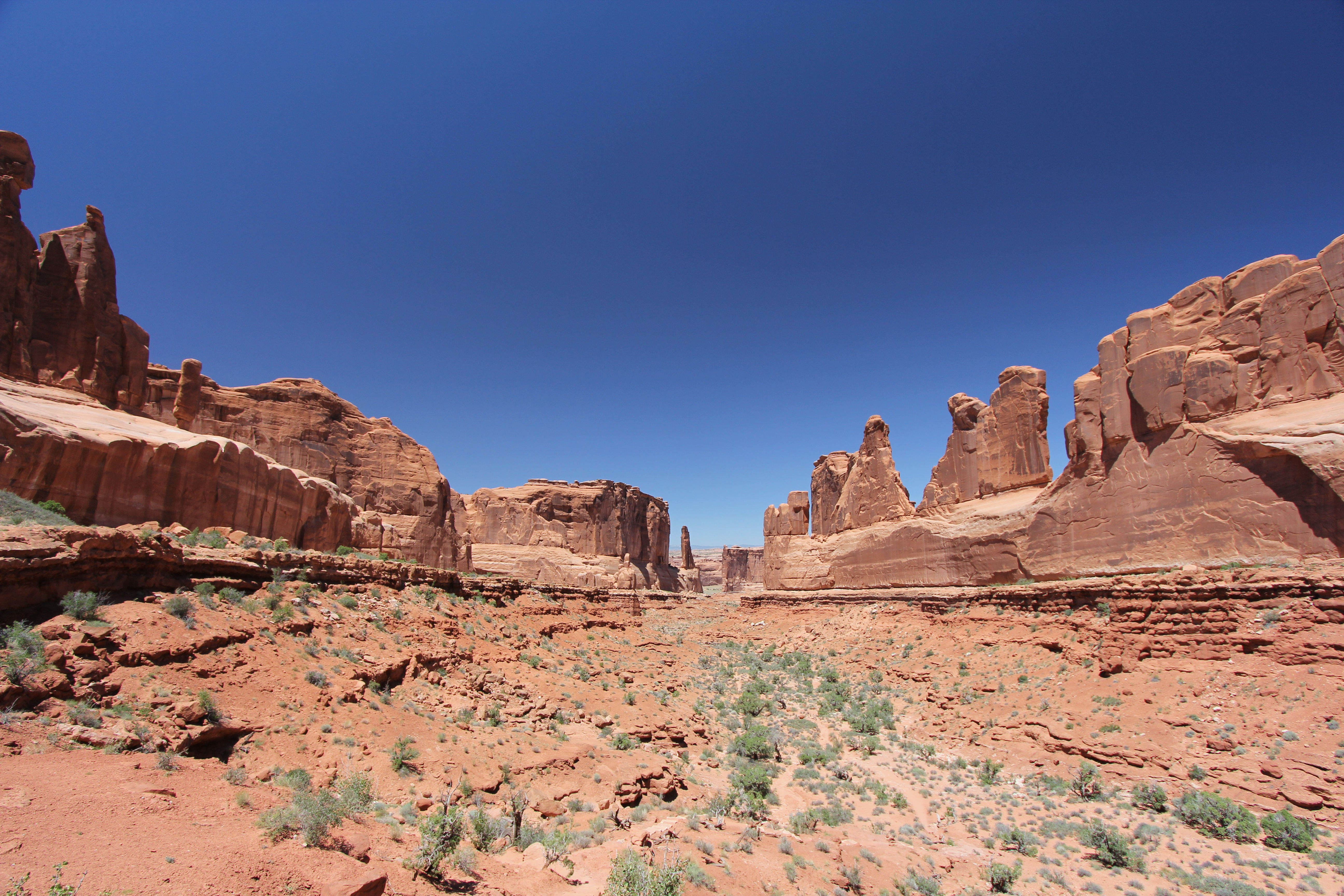 Arches 1